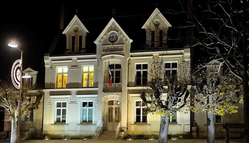 Mairie de Fondettes.